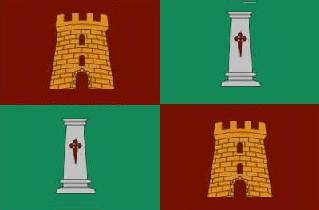 Bandera del Pilar de la Horadada (Alicante, España)